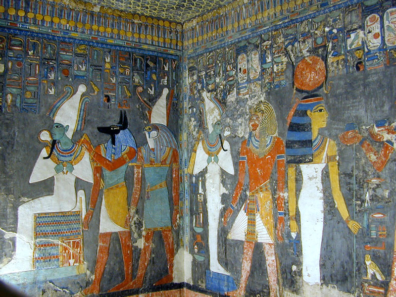 Détail de la frise du puits. Le Roi Horemheb en compagnie des Dieux. A gauche, Osiris, assis, Anubis à la tête de chacal et Horus, fils d'Isis à la tête de faucon. Horemheb a été le dernier pharaon de la XVIIIème dynastie. Il a rétabli le culte d'Amon en s'efforçant d'effacer toutes traces du prédécesseur de Toutankhamon, son père Aménophis IV : Akhénaton.